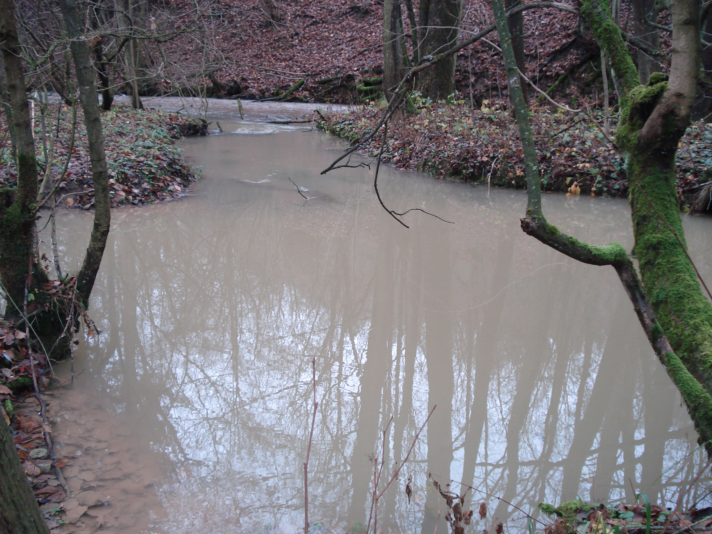 Quelltrichter der Lauter zwischen den Orten Tiefenlauter und Oberlauter, hier nach Starkregen mit Färbung durch lehmige Sedimente. Dies ist eine von mehreren Karstquellen aus dem Mittleren Muschelkalk. Diese Lauter fließt ab der Nordgrenze Bayerns (zu Thüringen, westlich des Thüringer Schiefergebirges) und mündet in Coburg, Oberfranken, in die Itz.